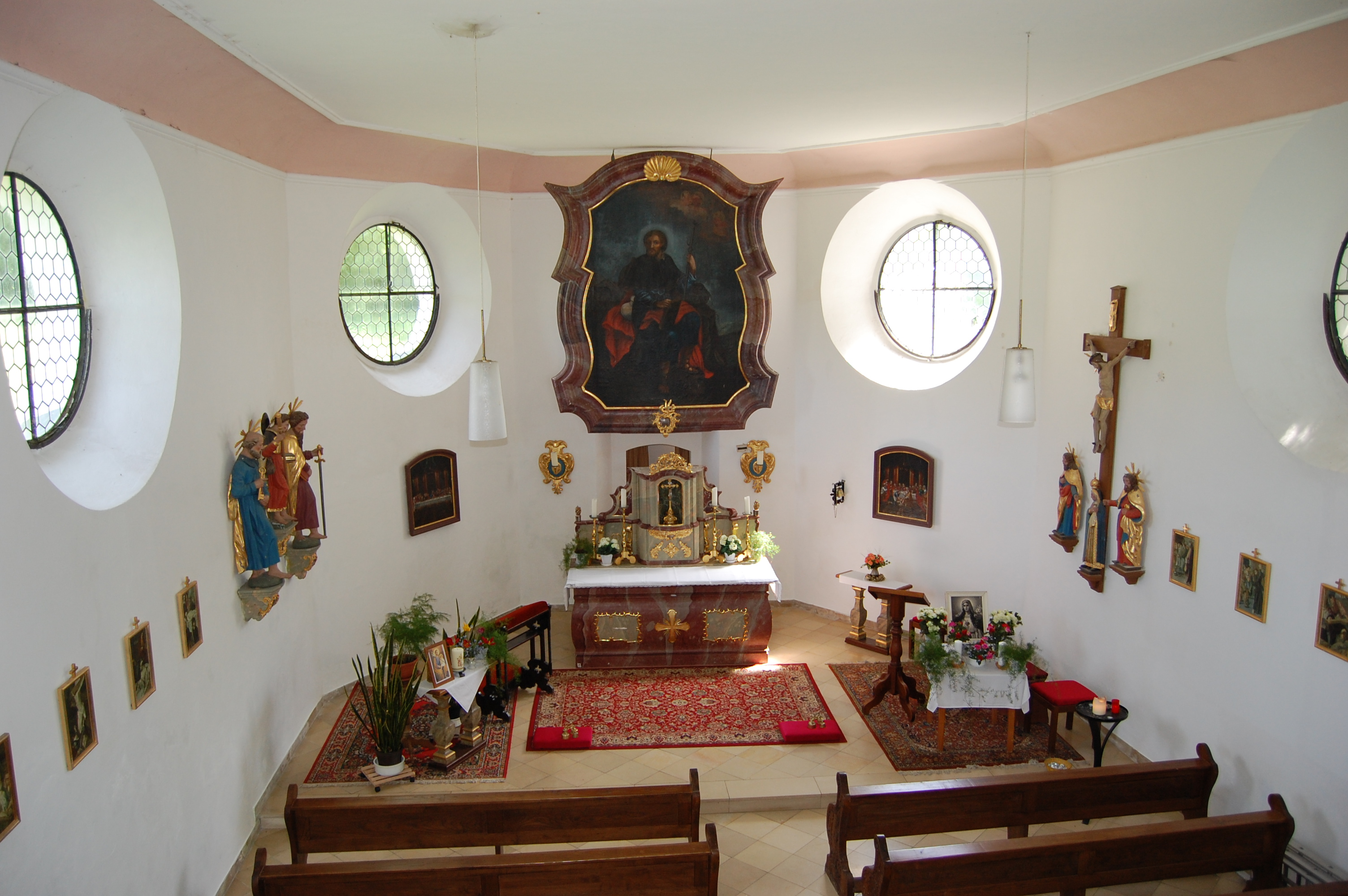 Innenansicht "Jakobikirche" Fuchsberg, Gemeinde Teunz, Landkreis Schwandorf, Oberpfalz, Bayern (2011)